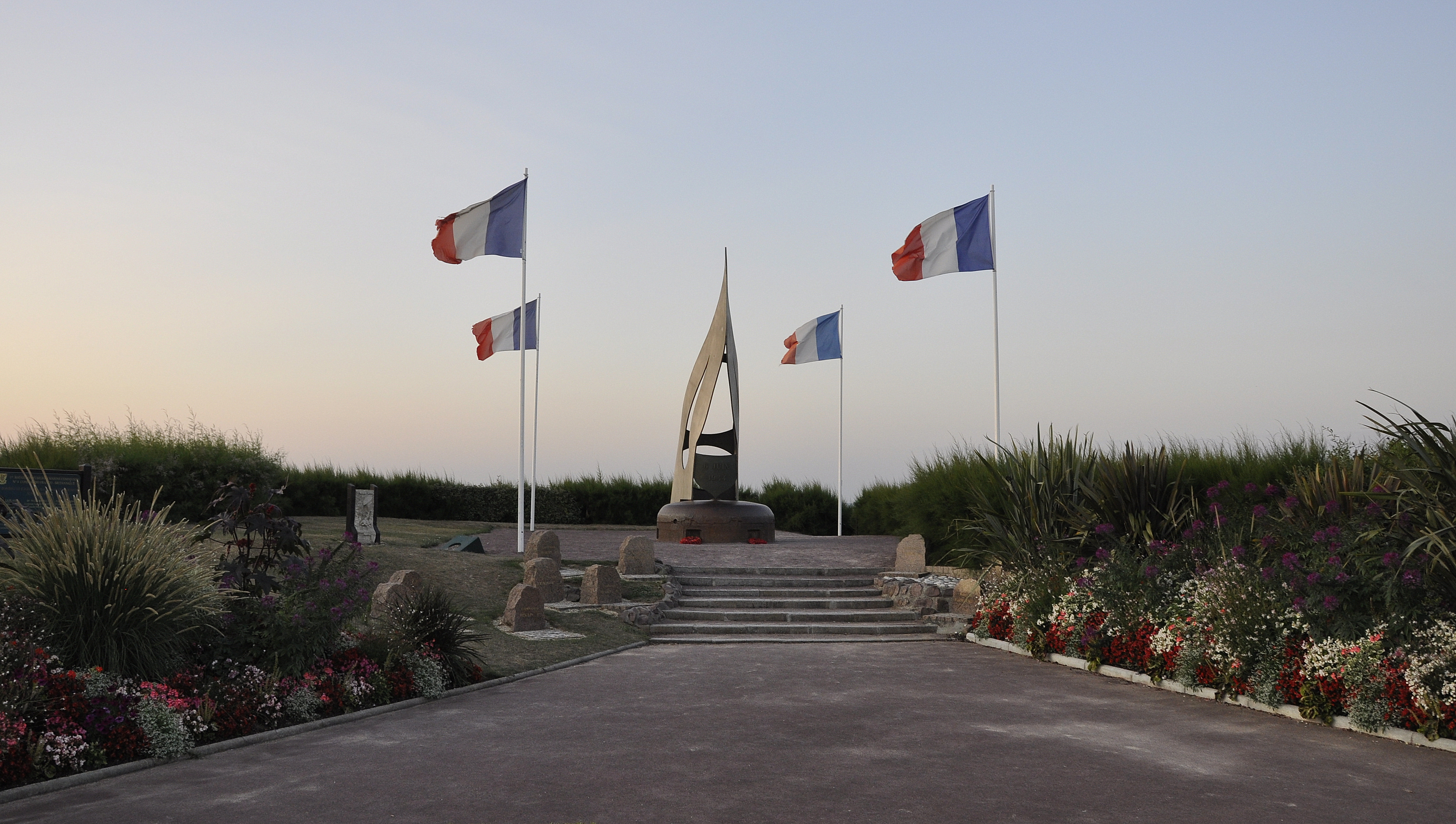 Monument voor het commando Philippe Kieffer op het strand te Ouistreham. Deze Fransman leidde zijn commando bij de verovering van Ouistreham op D-Day.